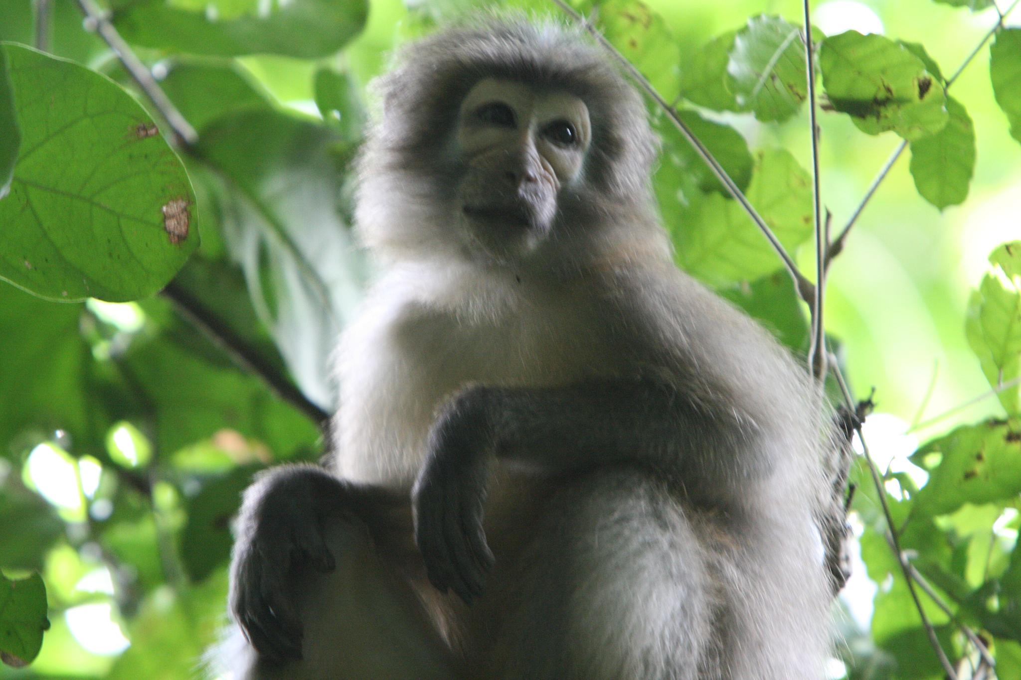 Tanzania -Sanje Mangabey